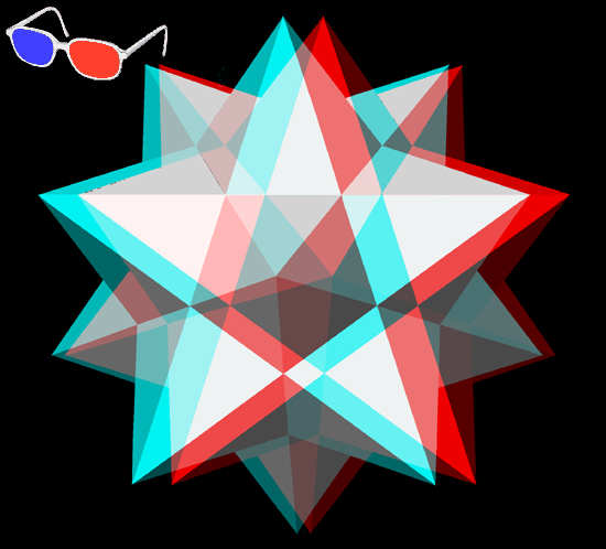 Geometrischer Koerper in anaglyphischer Darstellung. In AutoCad gestaltet, mit PhotoShop bearbeitet, Anaglyph mit Anabuilder erstellt, Brille einkopiert.